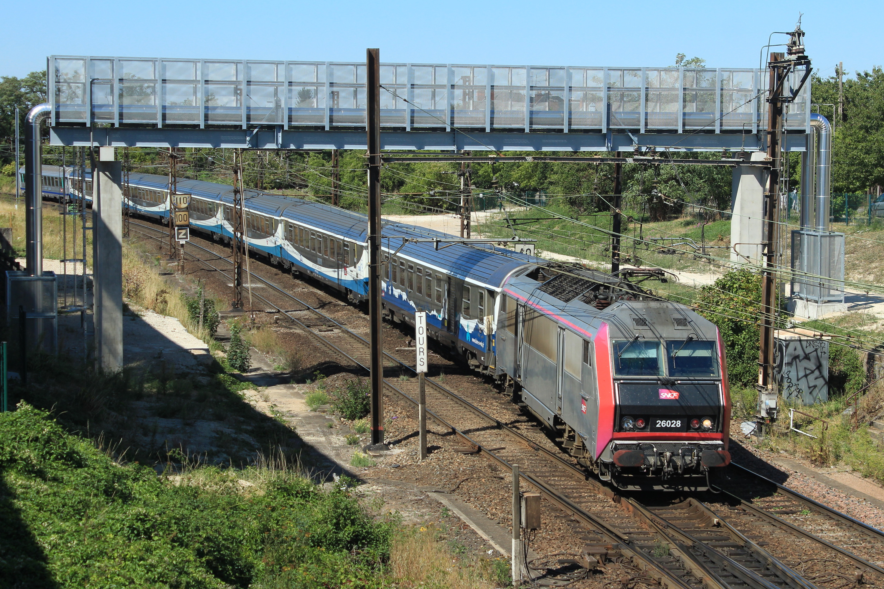 Le train TER n°860004 (Le Croisic - Orléans) tiré par la BB 26028 en livrée Carmillon approche de son terminus, au niveau du raccordement de Tours vers Orléans.